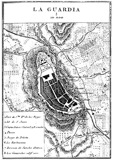 Guardiako planoa, 1840.